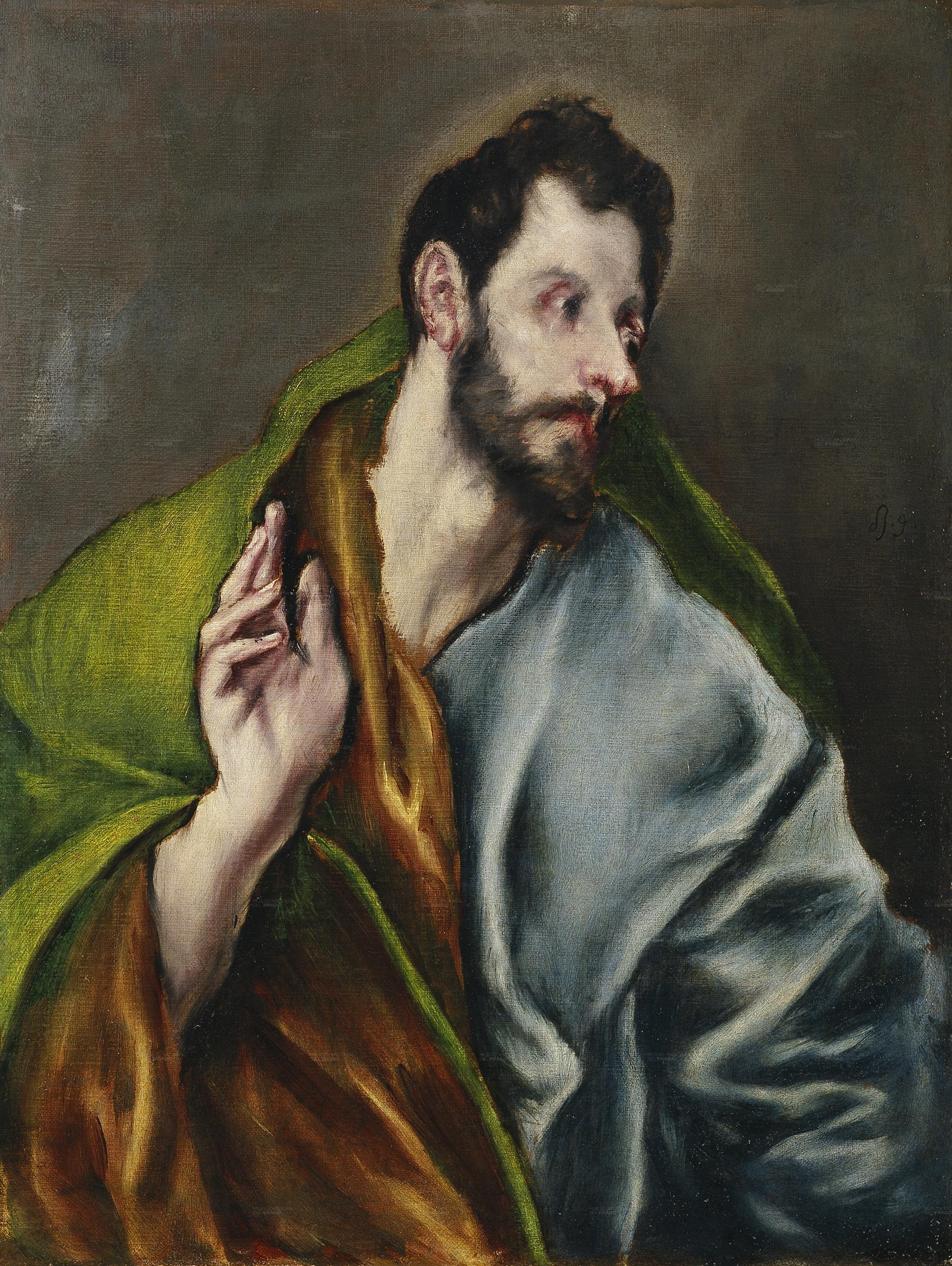 La obra representa al apóstol Santo Tomás.